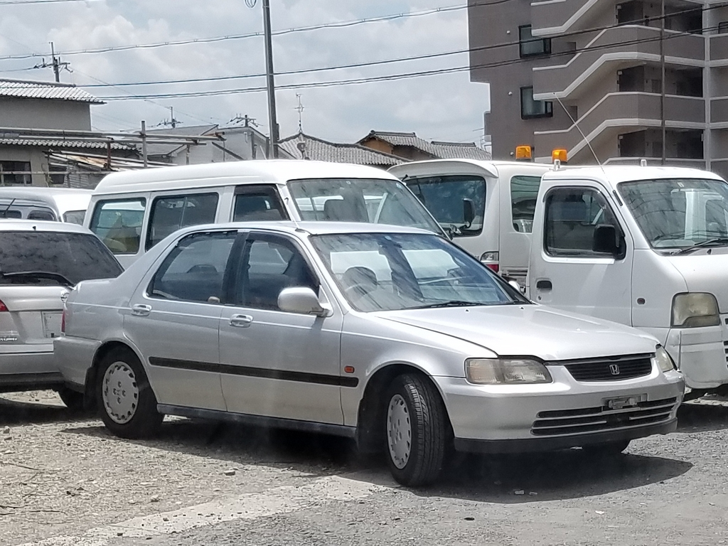 ドマーニ Vi